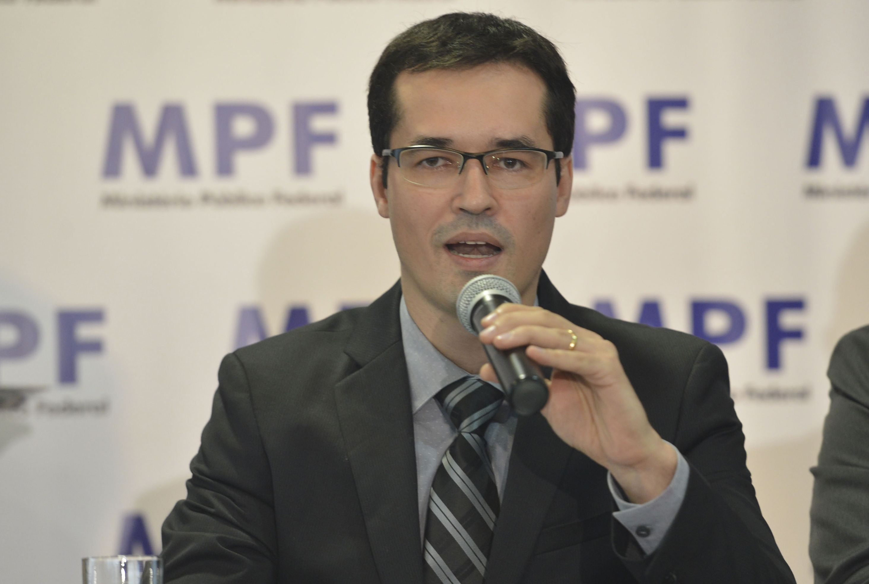 Deltan Dallagnol, coordenador da Operação, na cerimônia de devolução a Petrobras de valores recuperados pela Operação Lava Jato.